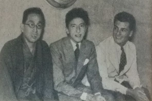 1936年の訪日時のジャン・コクトー（中央）